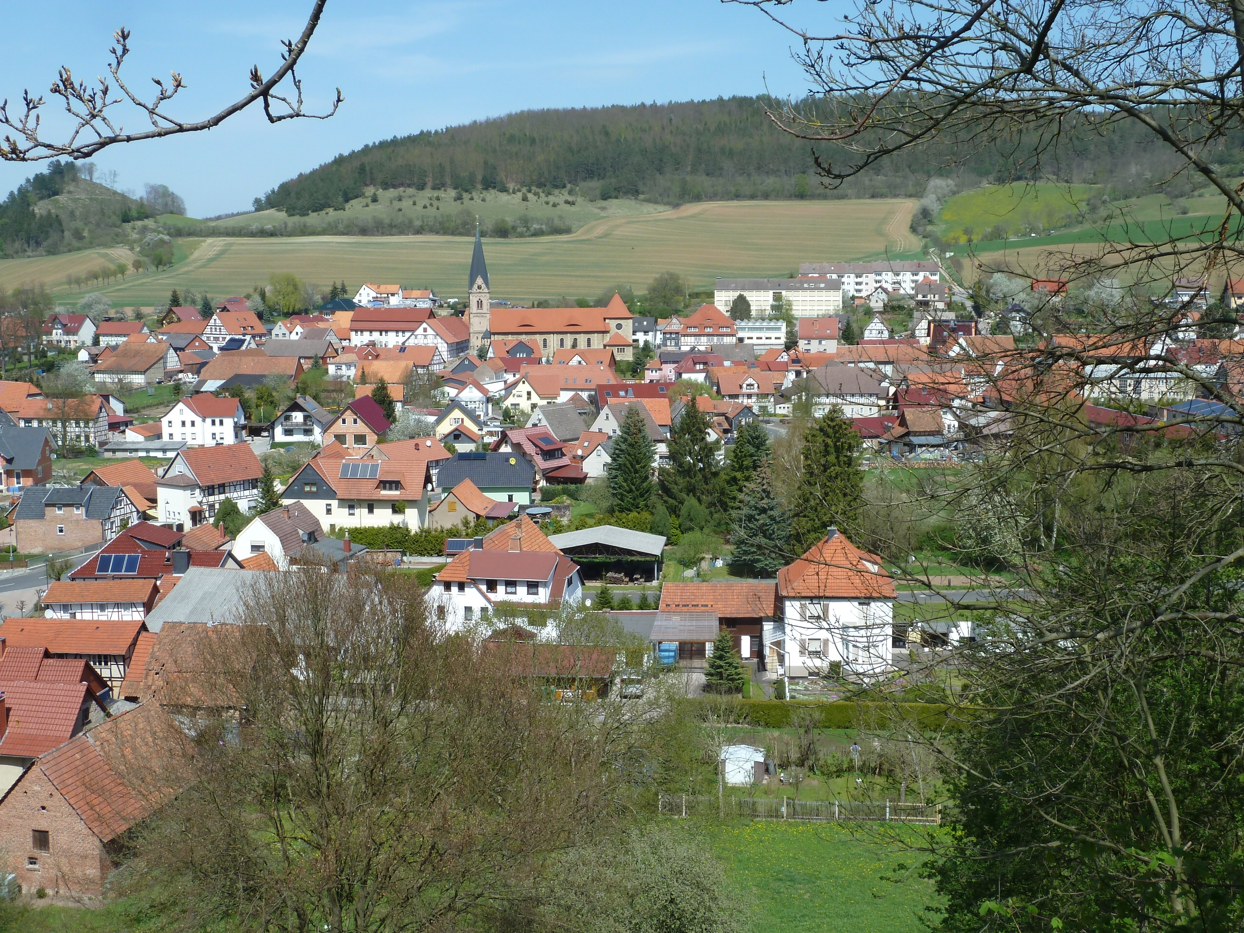 Blick vom Bahndamm der Kanonenbahn auf Geismar im Eichsfeld (im Hintergrund der Weinberg und ganz links der Iberg